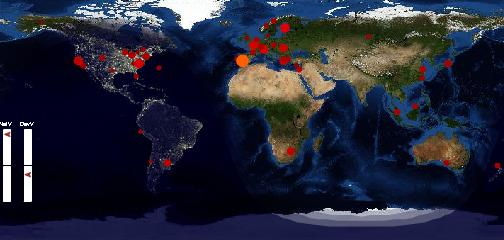 Localisation géographique des laboratoires participant au Global Consciousness Project en 2009. Copie d'écran.